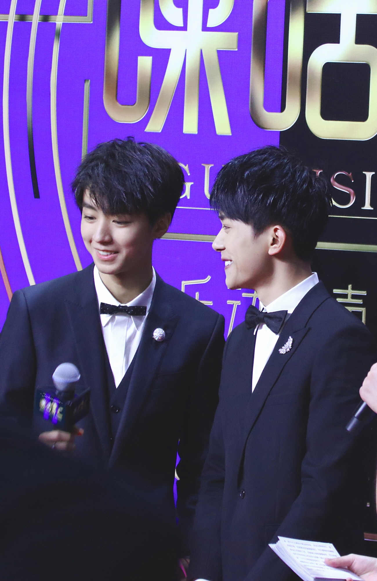 他们说的心动 到底是什么 (千凯千)